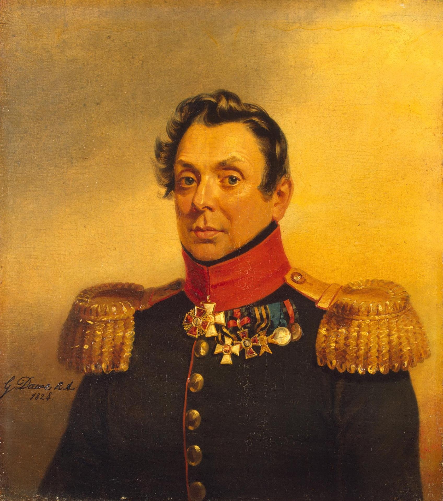 Mikhail Nikolaevich Ryleev 1-st (1771 – 1831) russian general